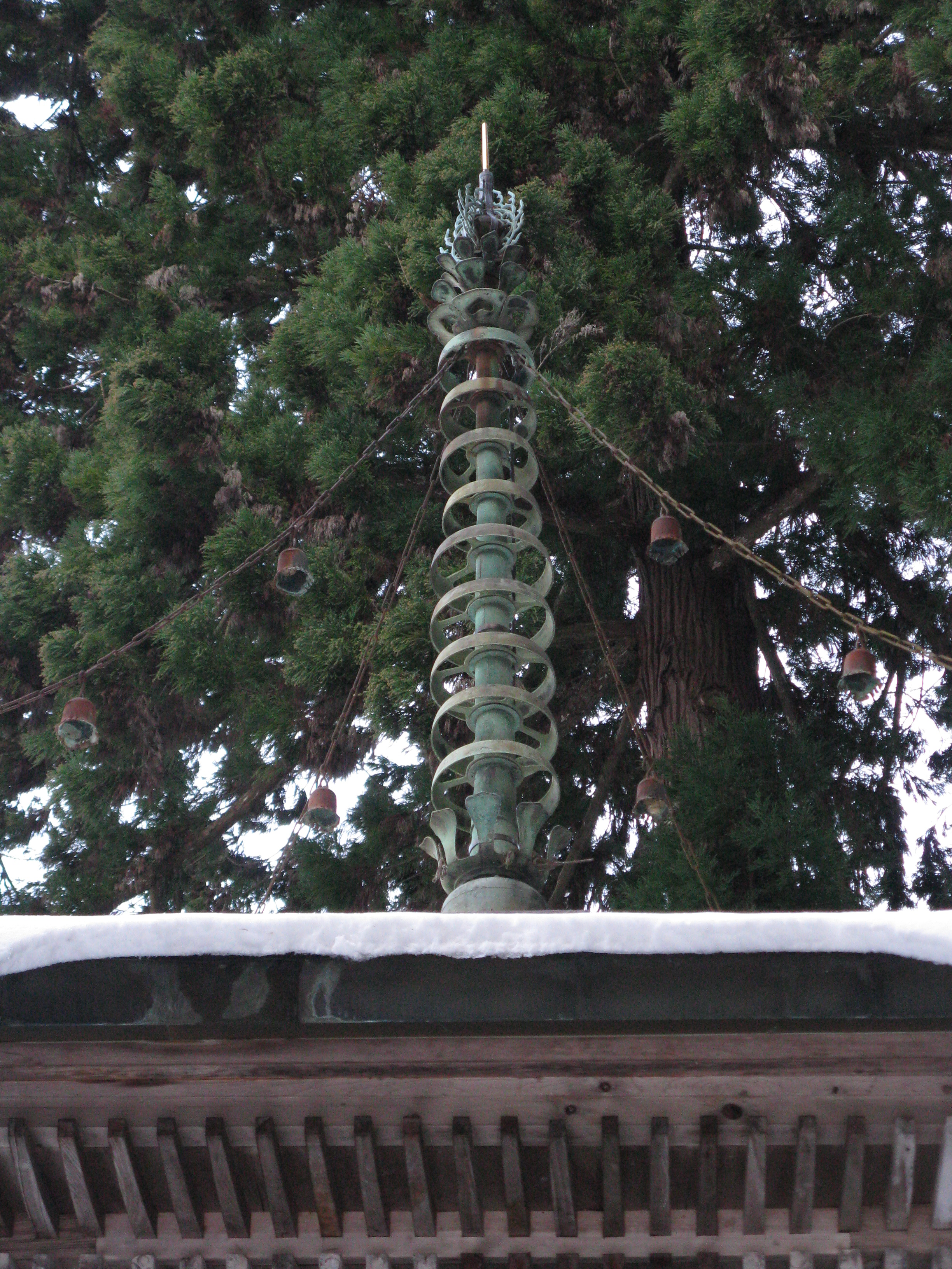 岩湧寺 多宝塔の相輪